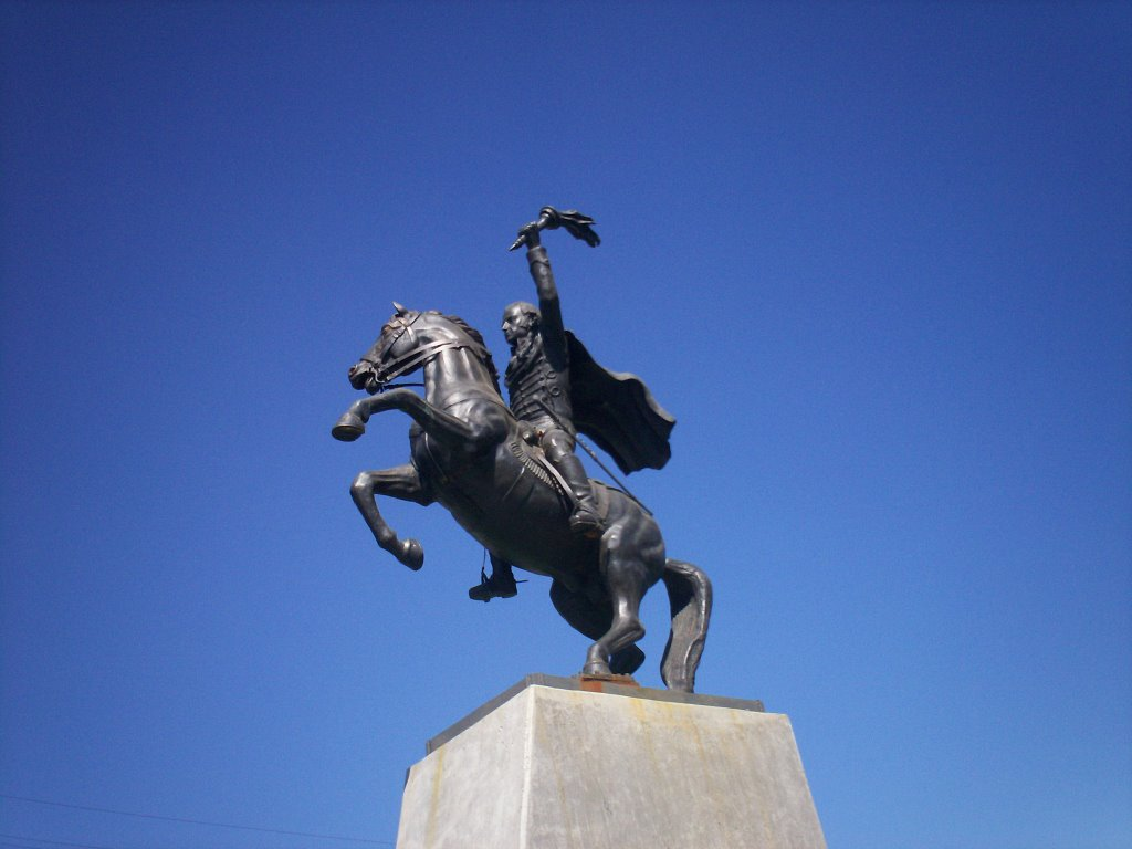 Uno de los principales referentes de Chiguayante